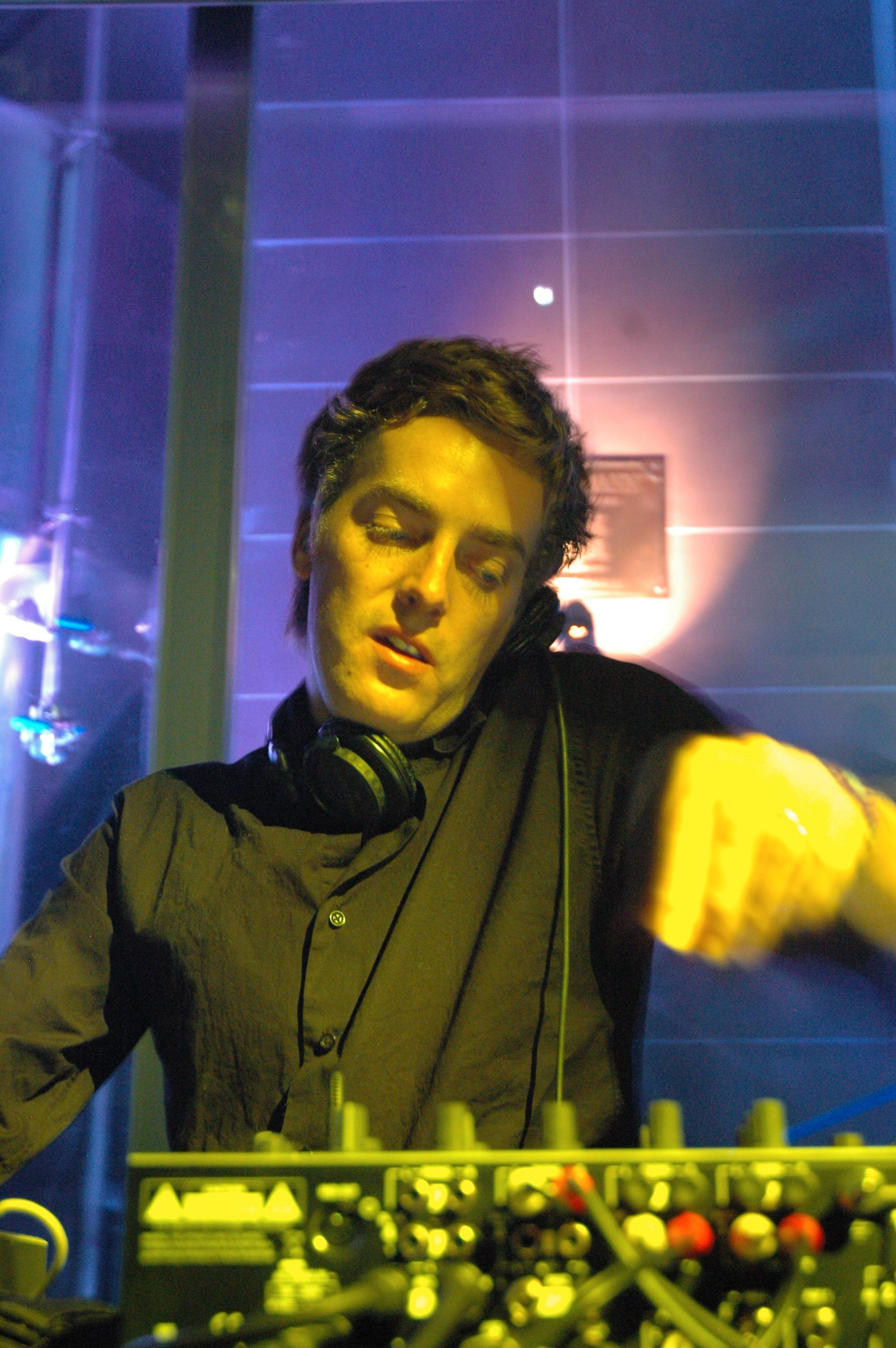 Adam Freeland DJ-ing in Istanbul, Turkey